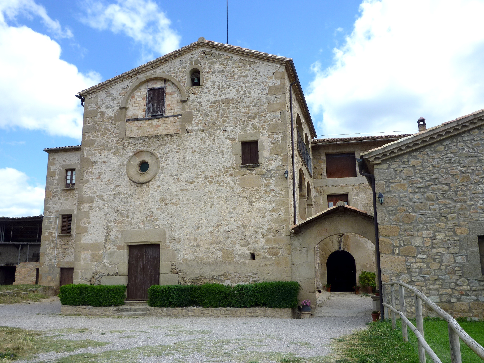 Masia de Postils a l'Aigua d'Ora (Navès): capella de la Puríssima This is a a photo of a natural area in Catalonia, Spain, with id: ES510ORA